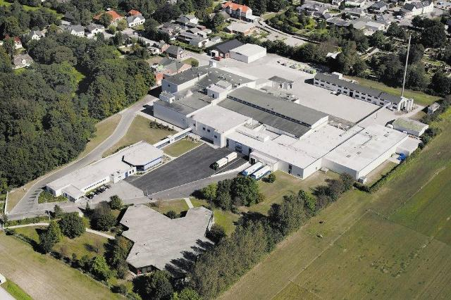 Redlefsen Werk in Satrup